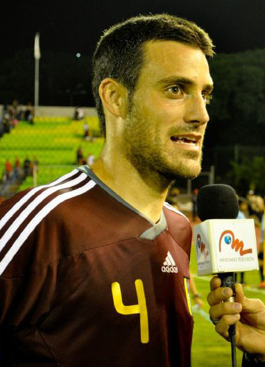 Andrés Túñez.